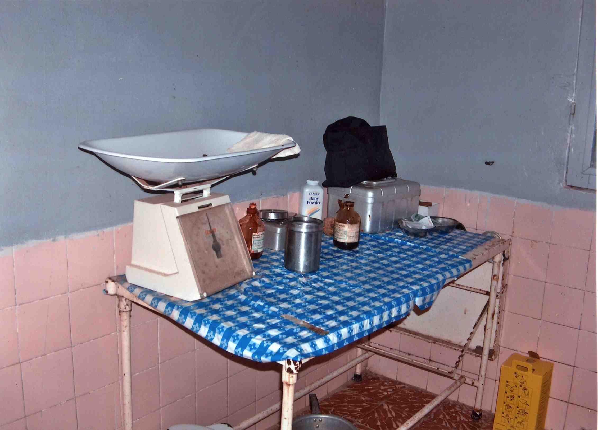 Matériel obstétrical d'une maternité, dans une île du Sine Saloum (Senegal)